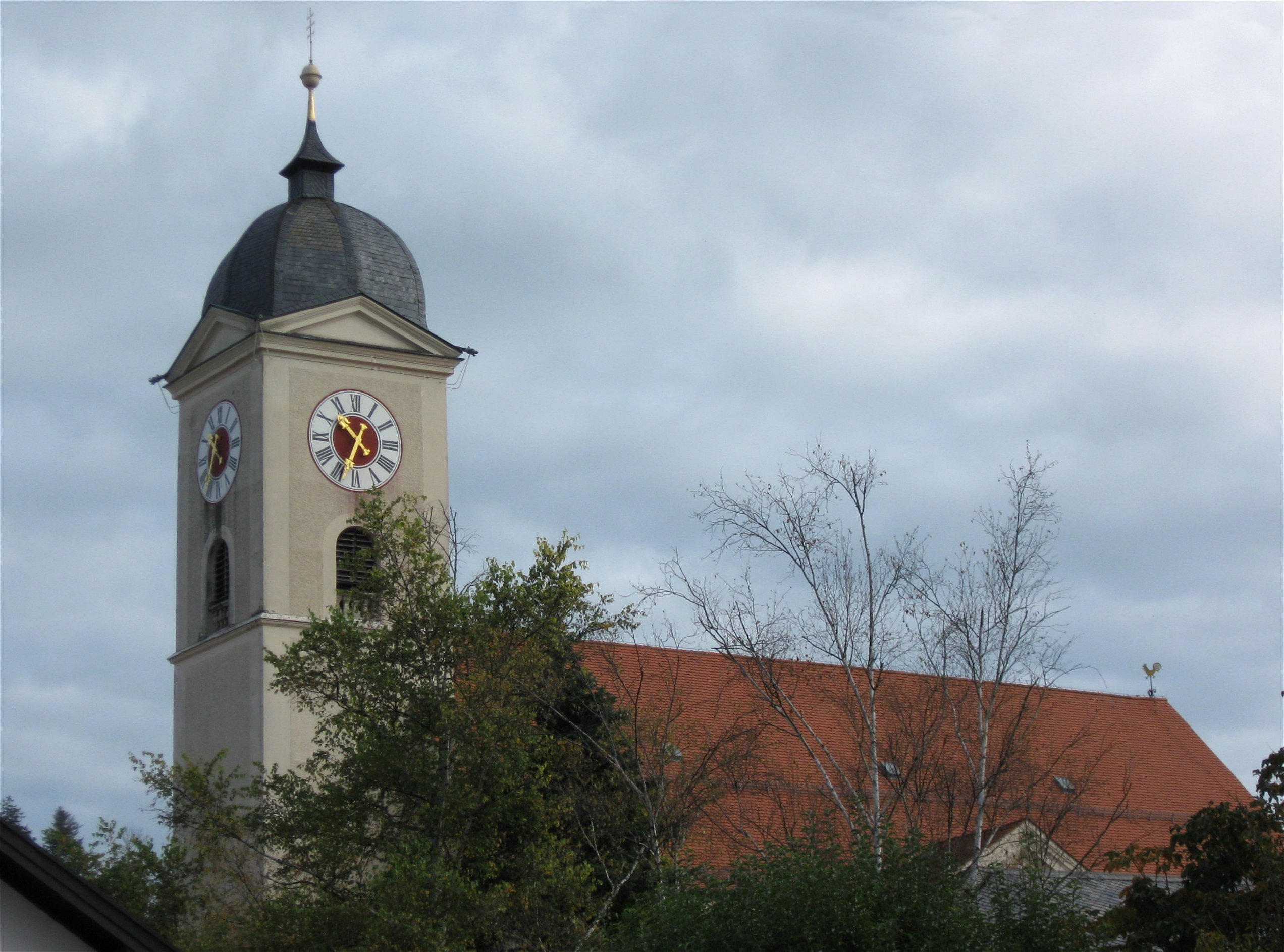 Münchener Straße 2; Grieblweg 5; Katholische Pfarrkirche St. Laurentius, Saalbau mit Satteldach und westlichem Turm mit welscher Haube, historisierender Neubau unter Einbeziehung des spätgotischen Turmunterbaus von Hans Schurr, südl. Turmwand bez. 1469, 1906 Neubau; mit Ausstattung; Kriegerdenkmal für die Gefallenen der Mordweihnacht von 1705, des Russlandfeldzugs von 1812, des Krieges 1870/71 und des I. Weltkrieges, Kalksteinrelief, um 1918; Friedhofskapelle, tempelartiger Massivbau mit Flachdach, dreibogigem Arkadengang, Mittelrisalit mit Satteldach und Putzgliederungen, histiorisierend, um 1906.